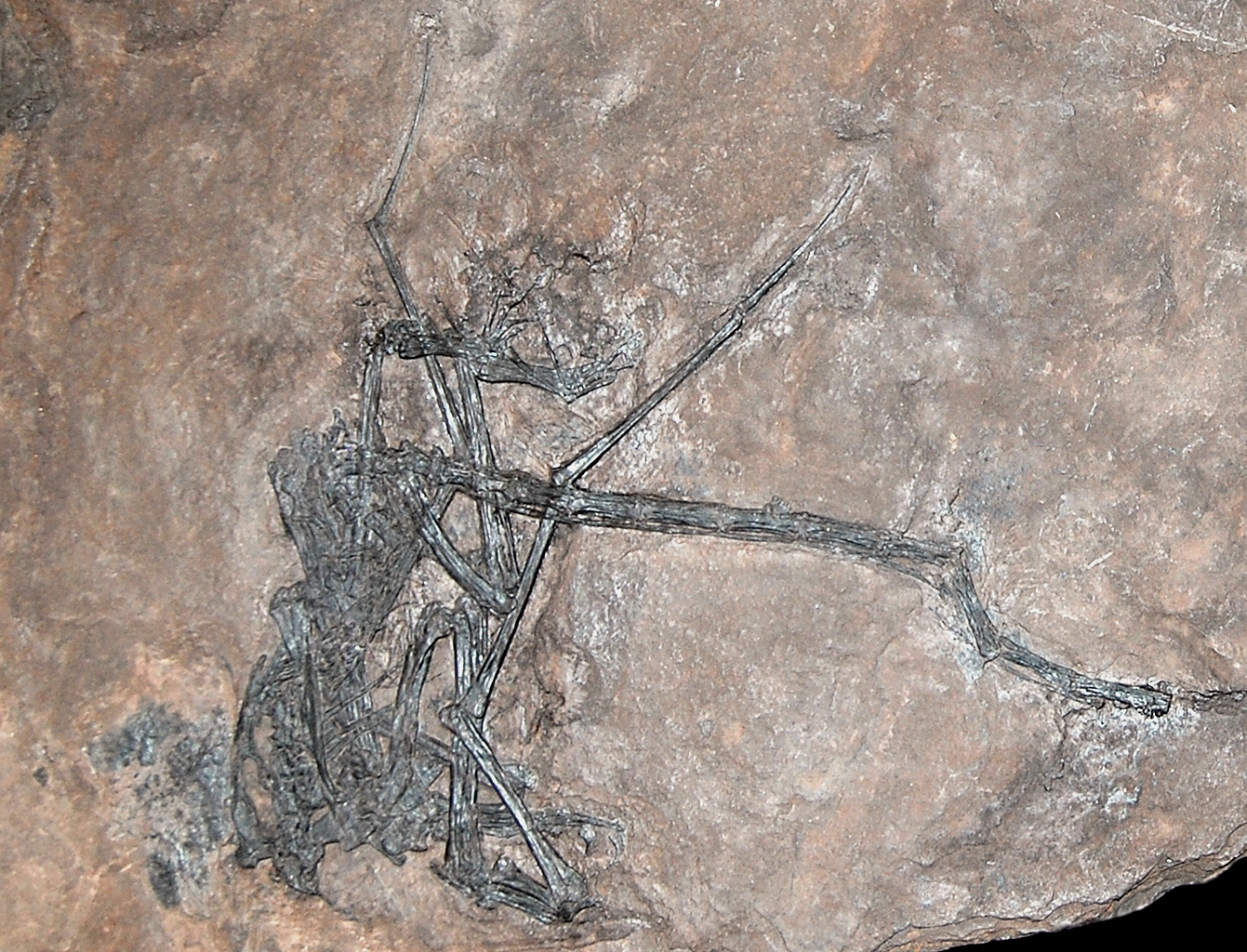 Museo civico di scienze naturali di Bergamo